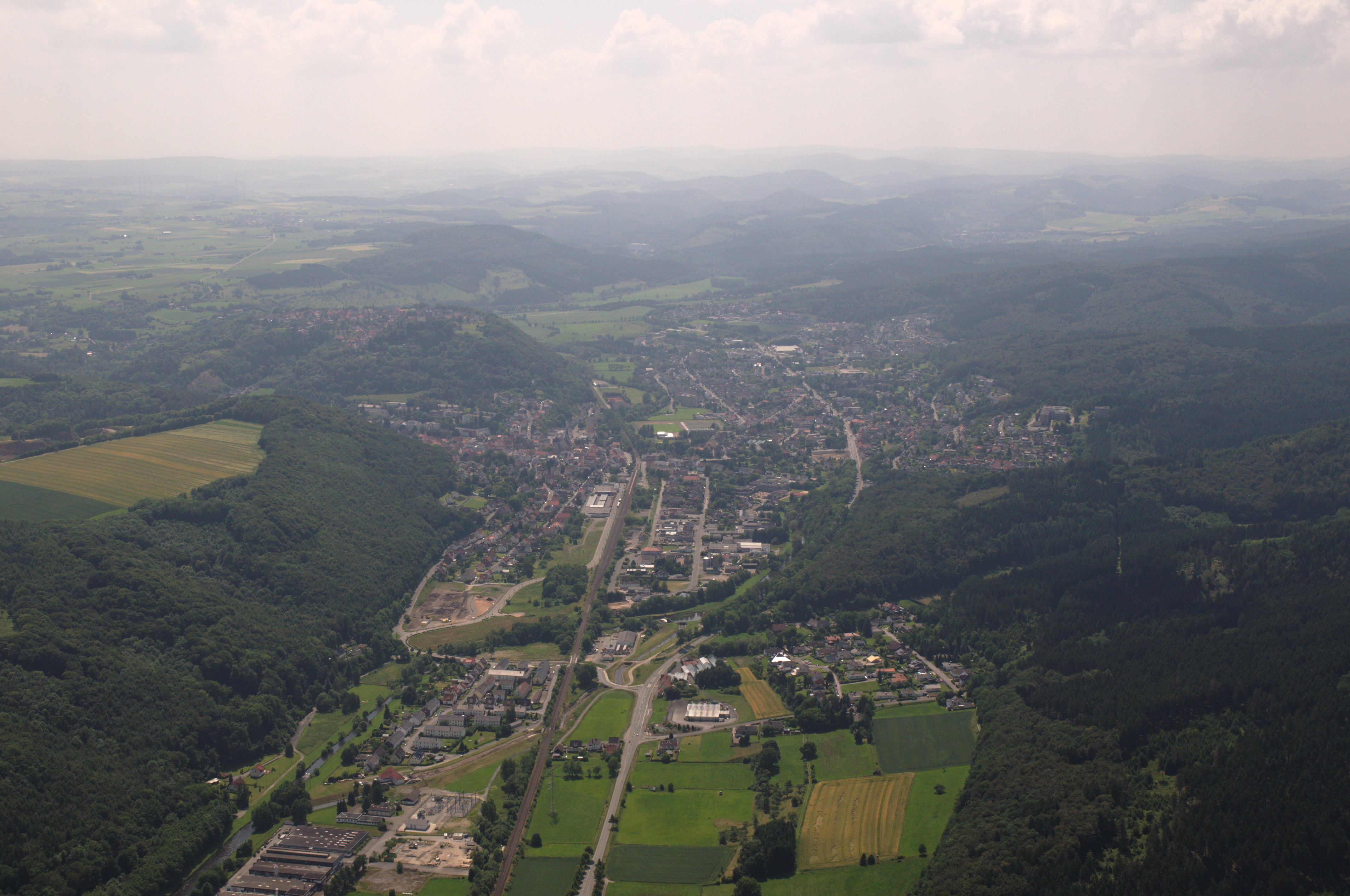 Fotoflug Sauerland-Ost, Niedermarsberg mit Obermarsberg in linken Bildhintergrund, rechts vorne Landschaftsschutzgebiet Diemeltalflanken um Niedermarsberg The making of this document was supported by the Community-Budget of Wikimedia Germany.